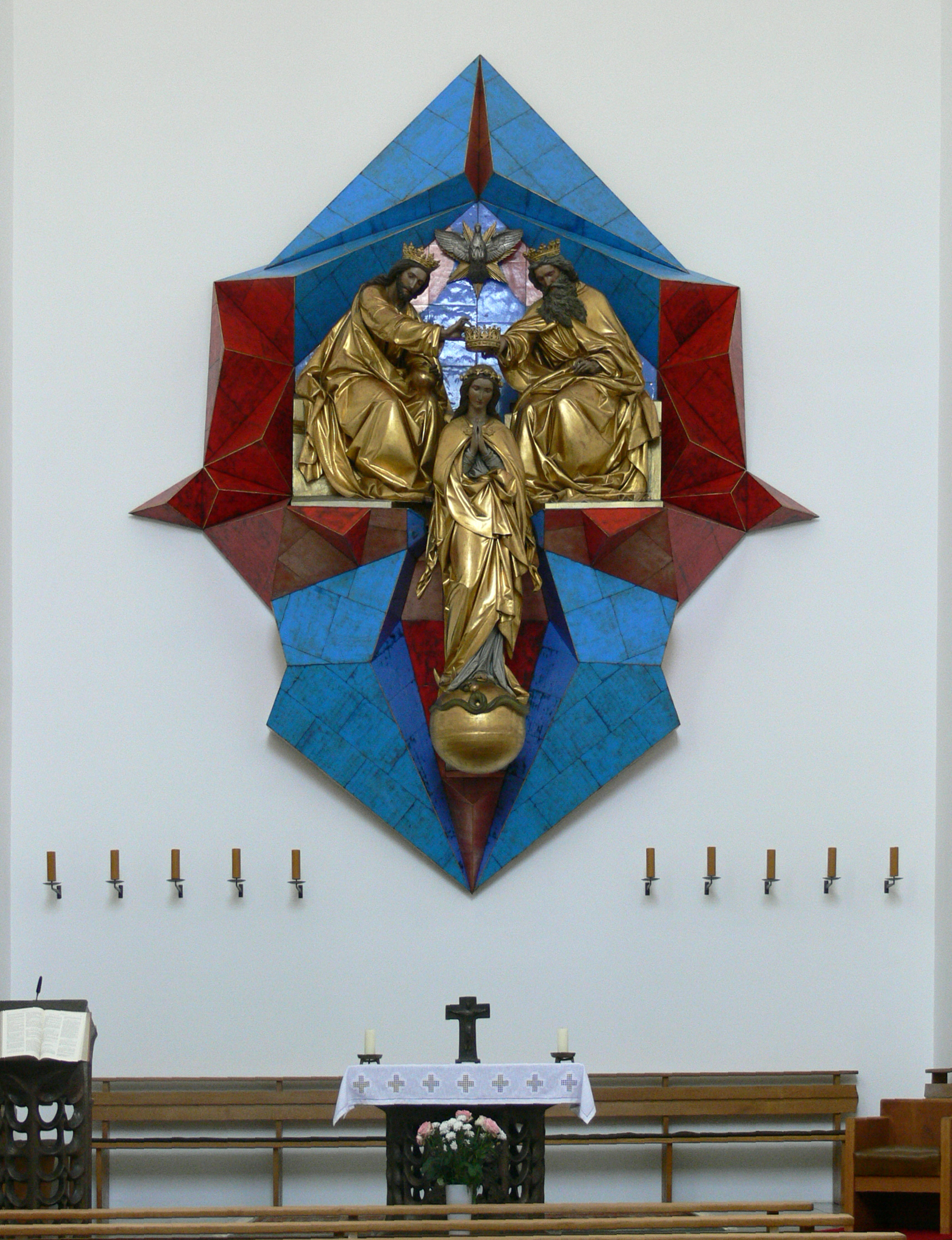 Passau, Marianische Votivkirche "Marienkrönung" von Joseph Knabl, 1863 (vor modernem Hintergrund von 1988), unten der Volksaltar